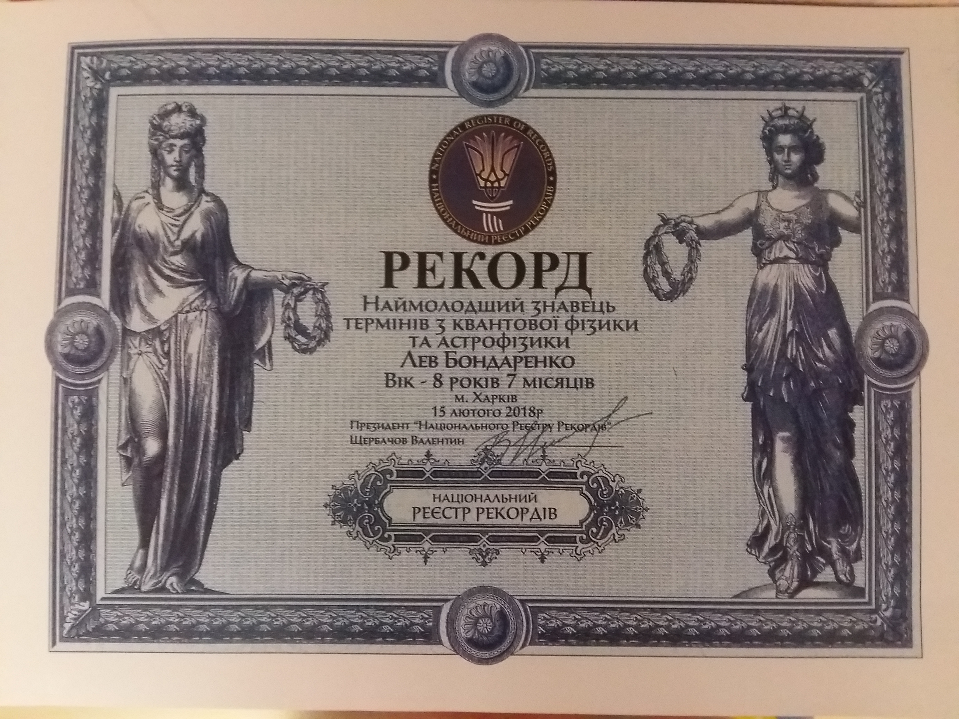 Четвертий рекорд України, Лев Бондаренко 8 років